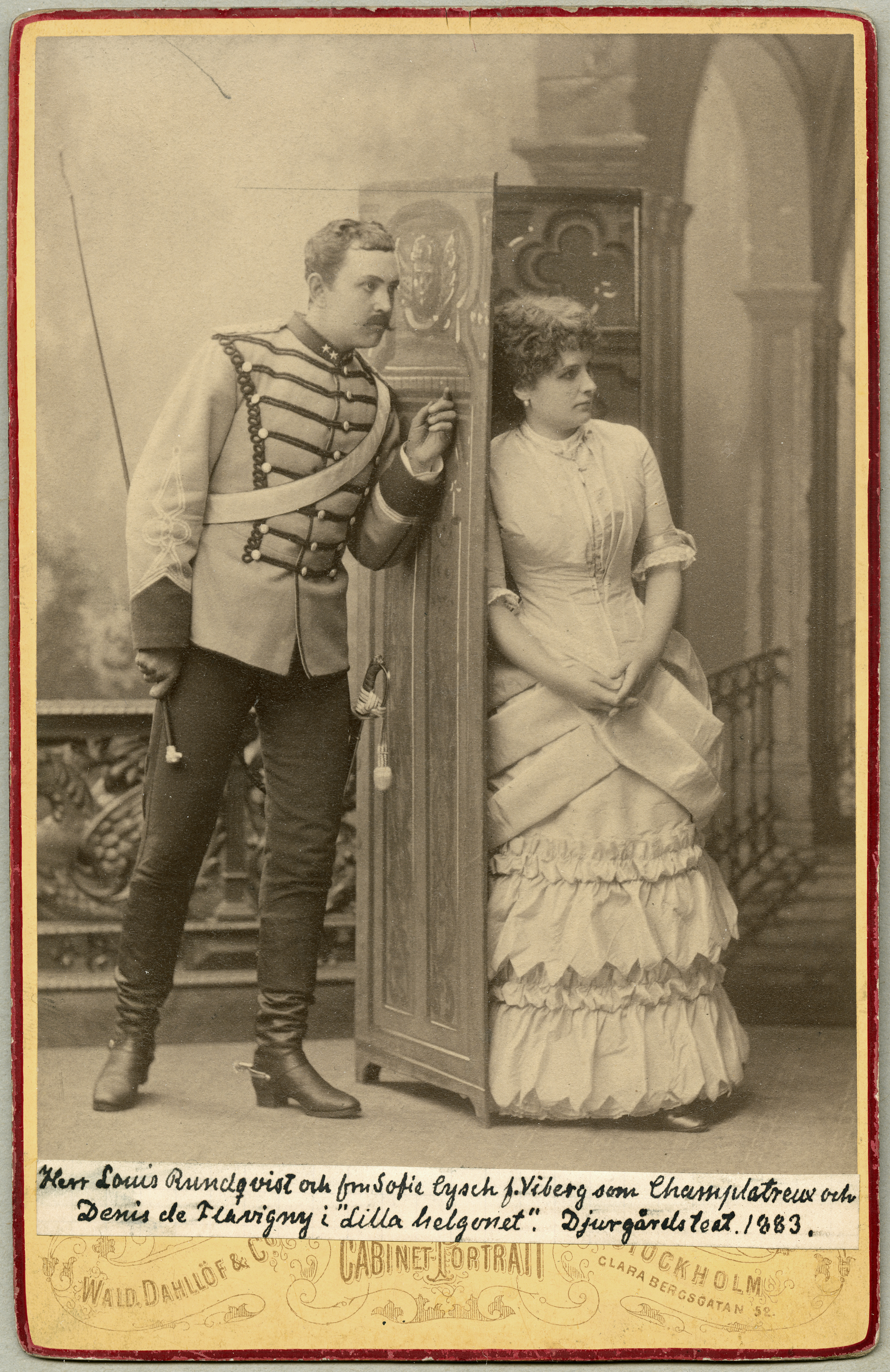 Louis Rundqvist som Champlatreux & Sophie Cysch som Denis de Flavigny i Lilla helgonet-2, Djurgårdsteatern 1883